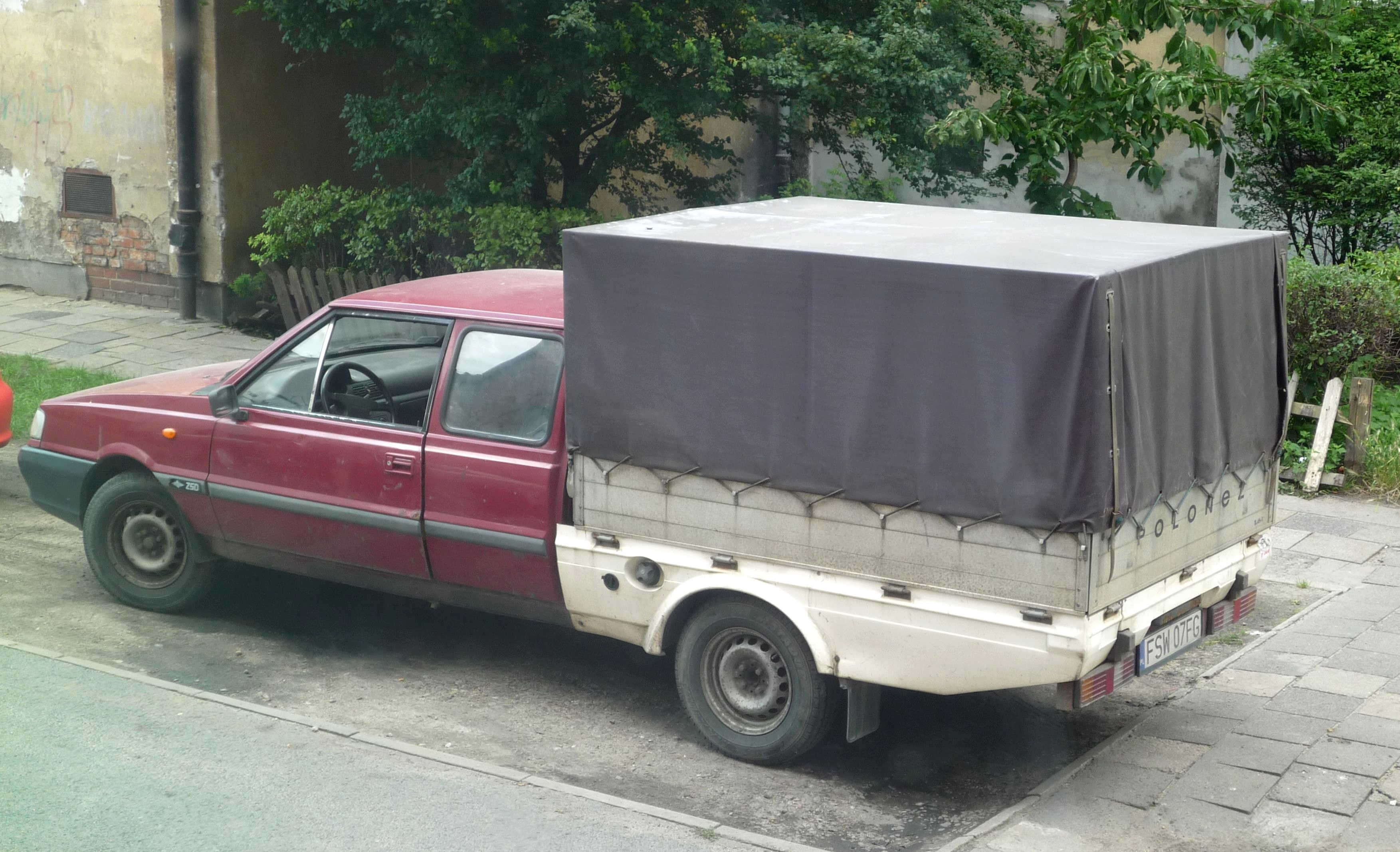 Daewoo-FSO Polonez Truck Plus DC 1.6 i z lat 1997-1998 w Słubicach.